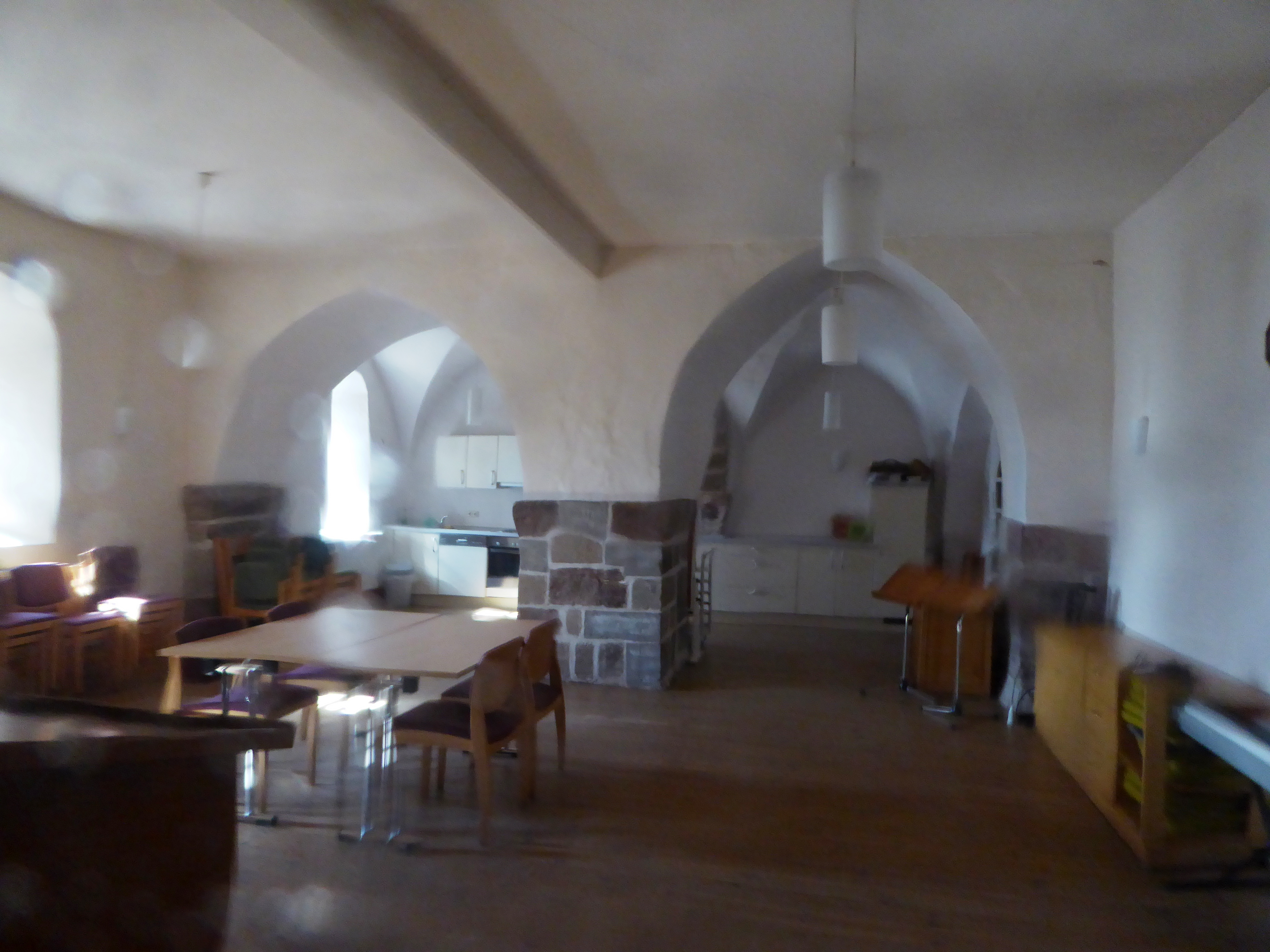 Gemeinderaum der ev.-luth. Kirche St. Chriostophorus in Reinhausen, Gemeinde Gleichen, Südniedersachsen. Der Gemeinderaum, der auch als Winterkirhce genutzt wird, liegt im Westteil der Kirche im Erdgeschoss. Hier ein Blick durch das pfofilierte Türglas nach Norden auf den Wandpfeiler des Nordturms, die beiden aufliegenden spitzbogigen Gurtbögen und das dahinterliegende Kreuzgratgewölbe (darunter eine Küchenzeile). Die Belichtung erfolgt über die Fenster der Westfassade.